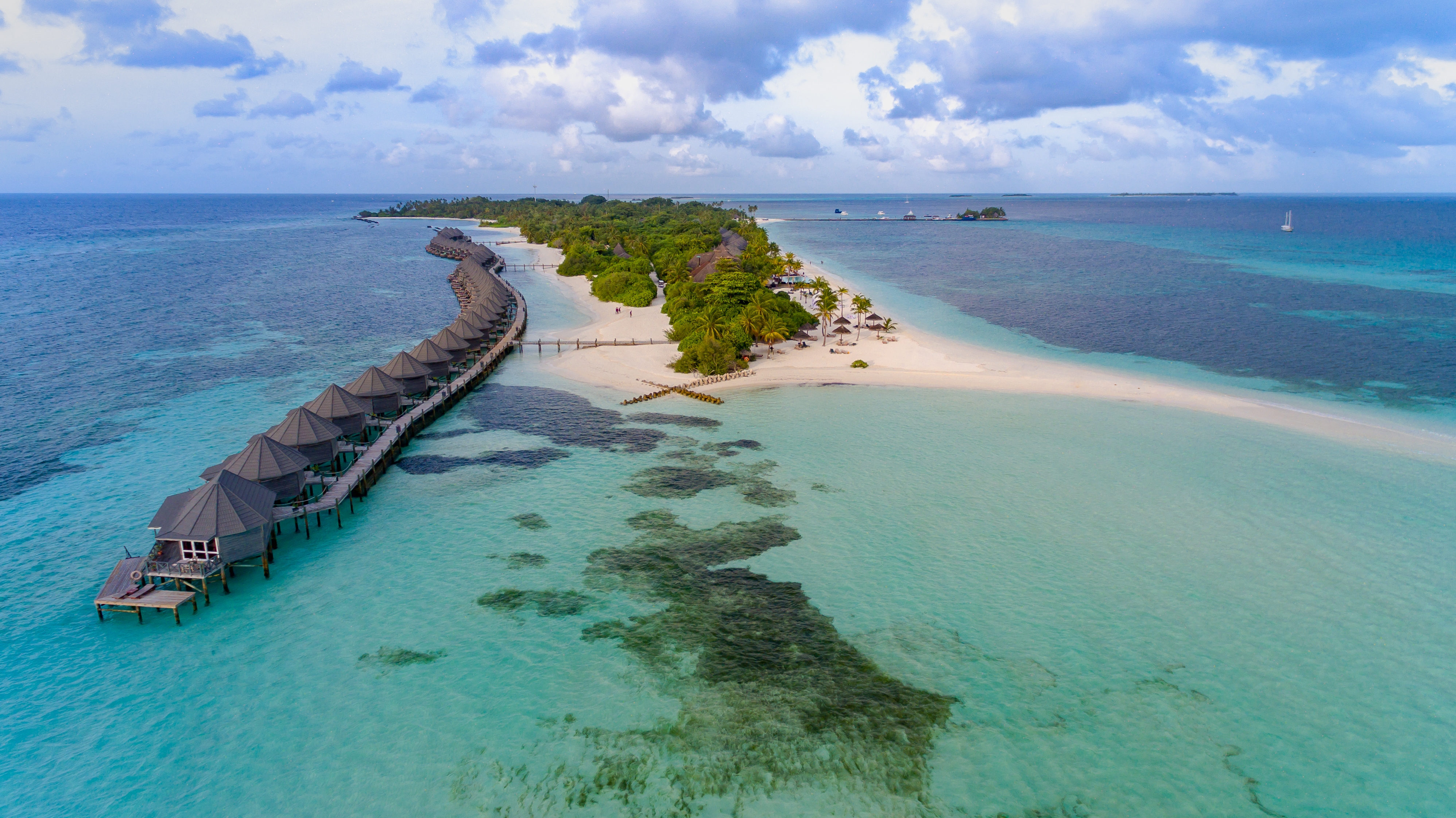 Malediven Wasserbungalow